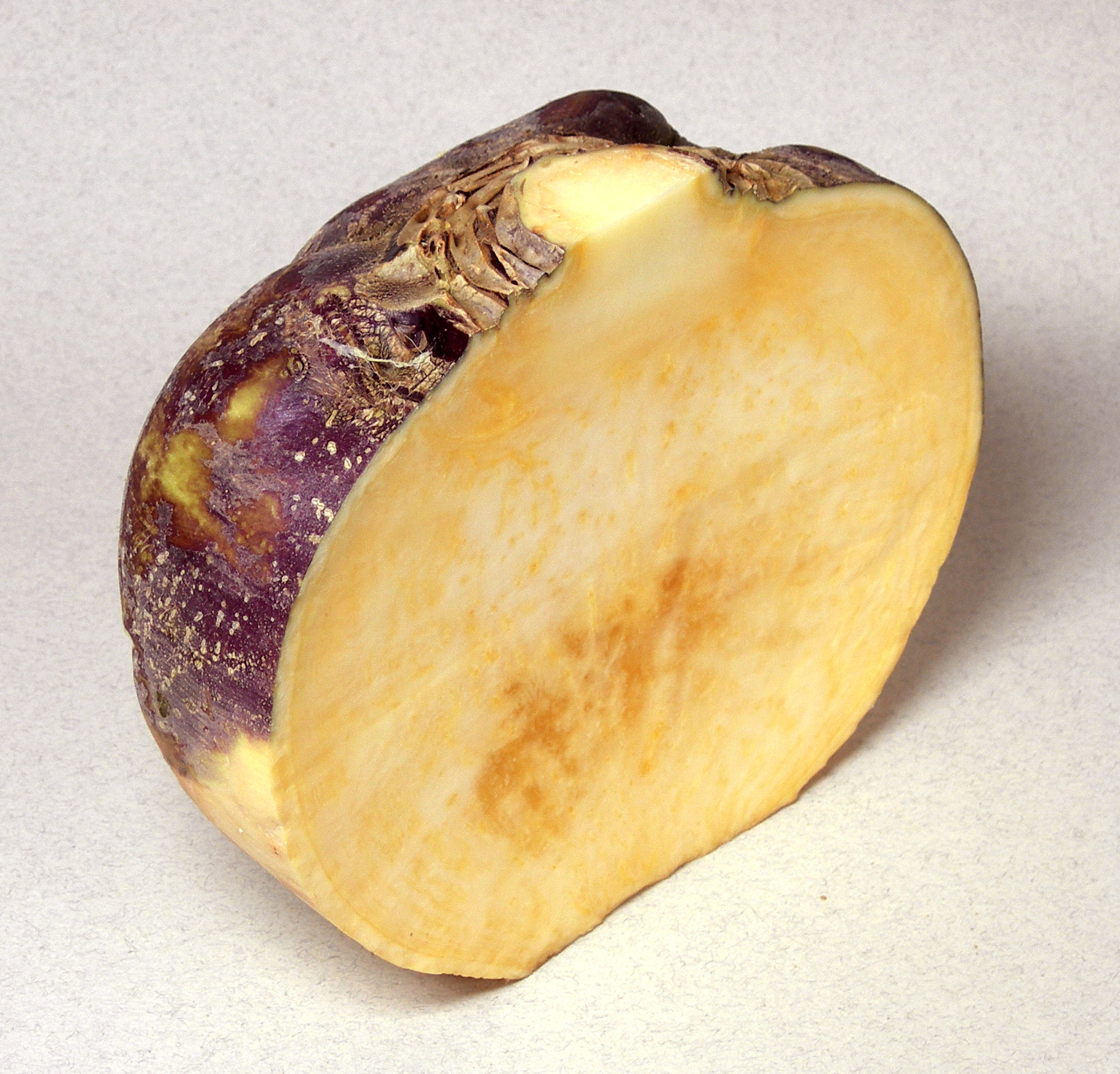 Steckrübe (Brassica napus), angeschnitten. Eigene Aufnahme.